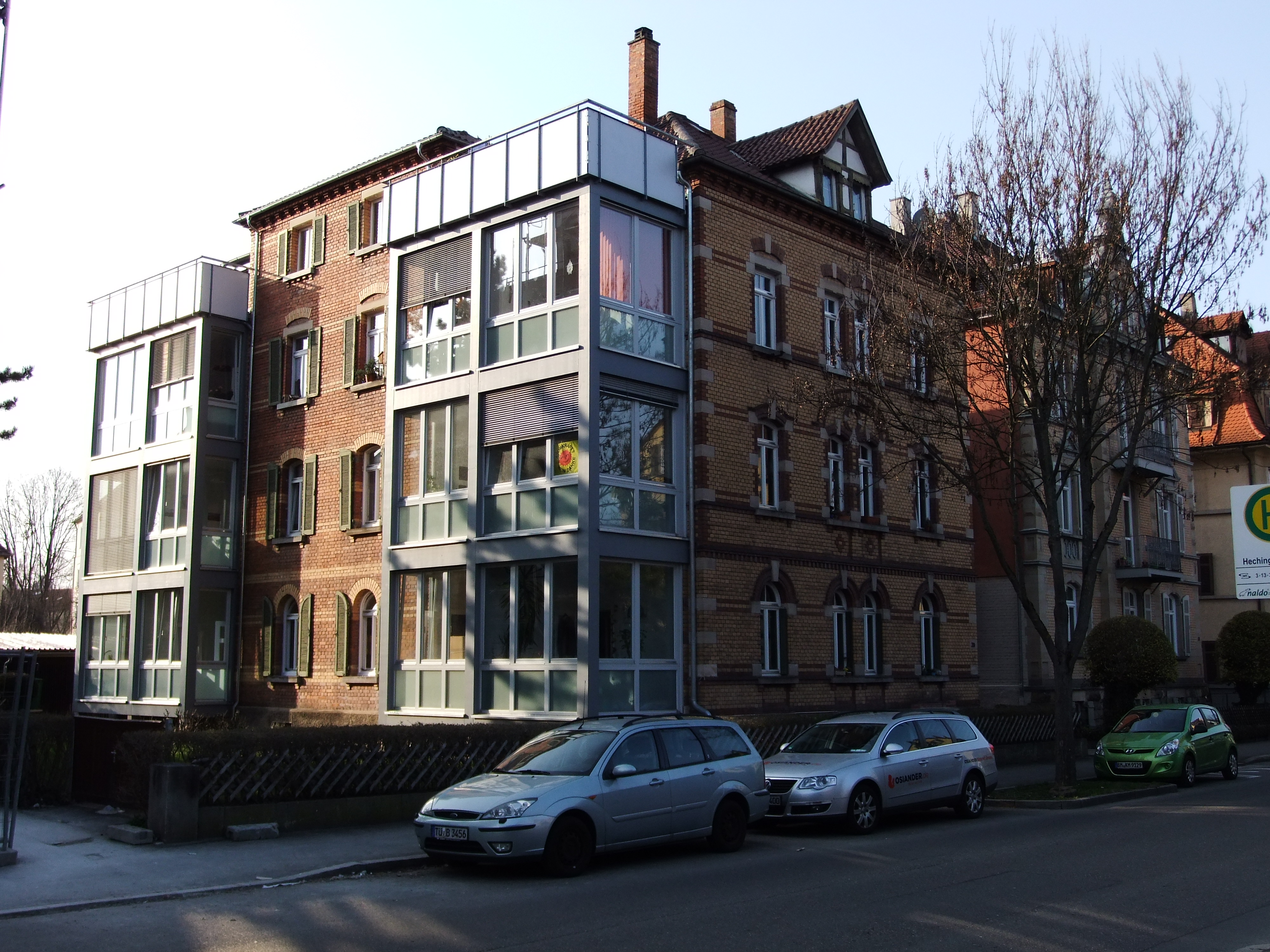 Mathildenstift in der Hechinger Straße in Tübingen. Durch Bebauung der früheren Holzbalkone mit Aluveranden wurde der Charakter des Gebäudes deutlich verändert.